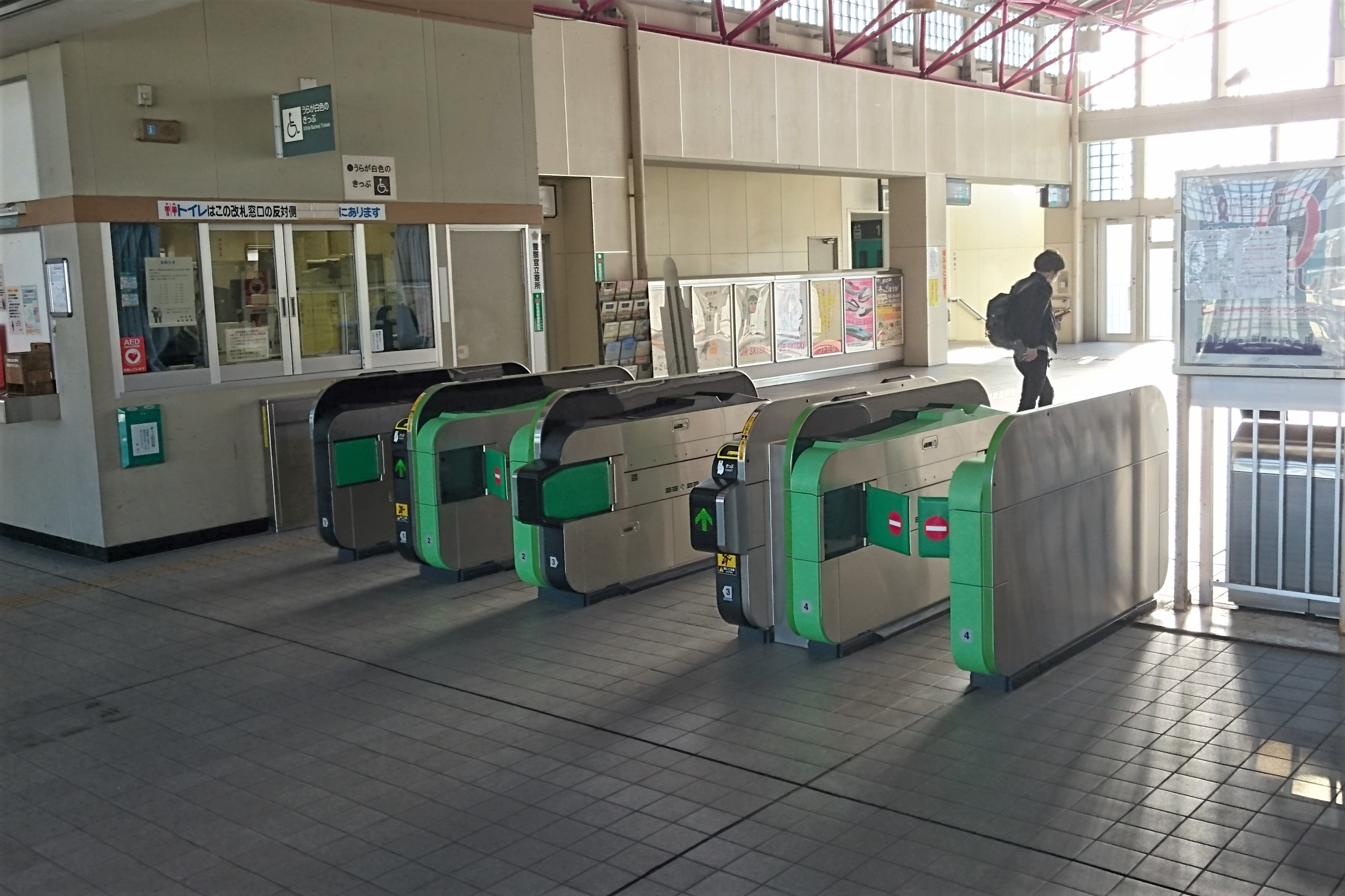 布佐駅改札口